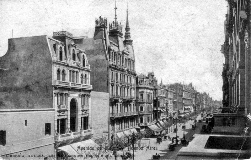 Vista de la Avenida de Mayo desde un balcón del Palacio Municipal de Buenos Aires, hacia 1900 o 1905. Se ven, de izquierda a derecha, los fondos del viejo Cabildo, el antiguo Pasaje Roverano, un lote sin construir, la Tienda "A la Ciudad de Londres", la calle Perú y demás edificios.